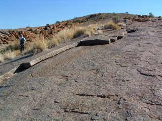 Batholite dans le Parc d'Augrabies, Afrique du sud, juillet 2006, photo personnelle.